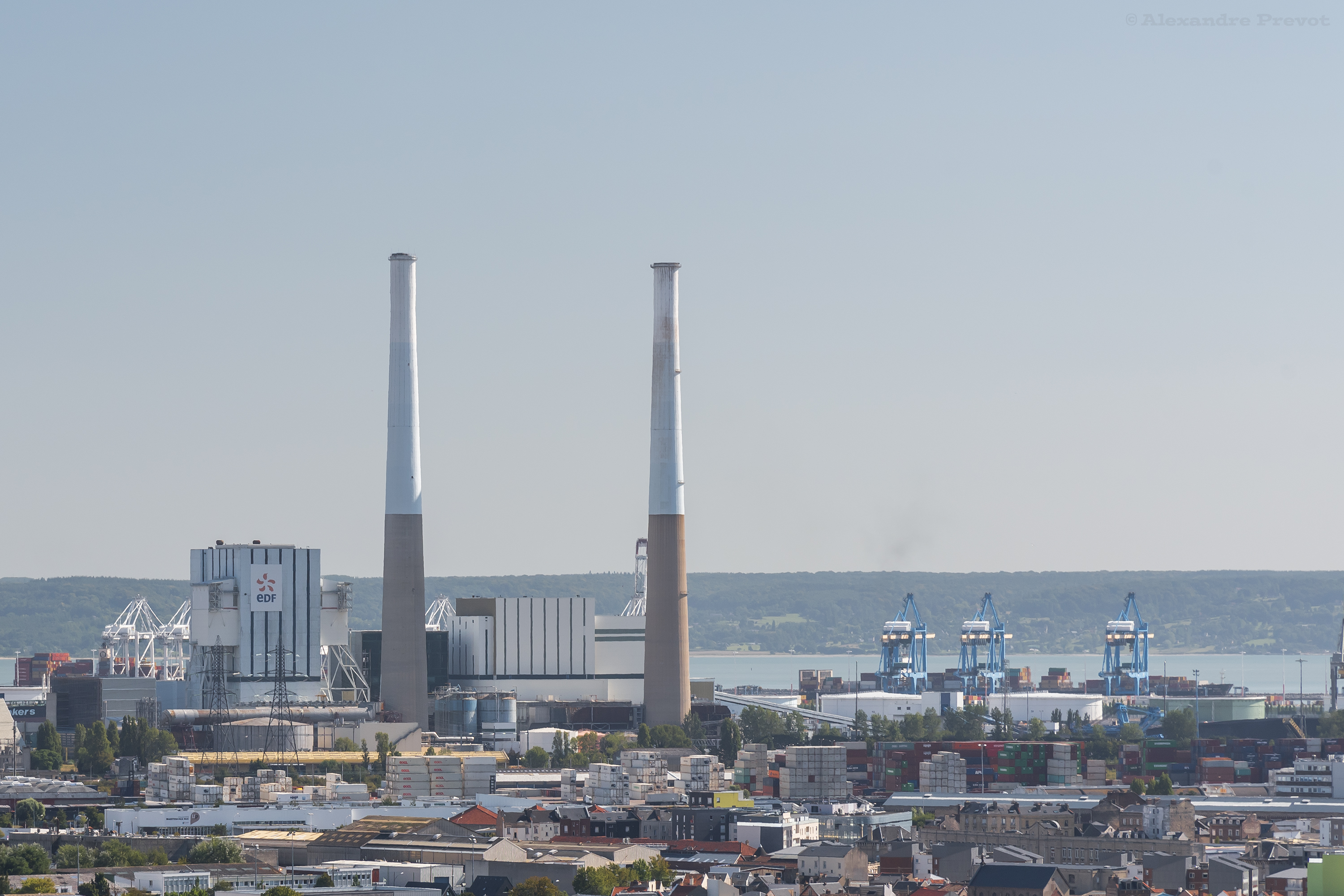 La fermeture de la centrale doit être fermée avant 2022 dans le cadre de la loi PPE. Localisation Pays : France 🇫🇷 Région : Normandie Département : Seine-Maritime (76) Ville : Le Havre (76600) Quartier : Le Port Adresse : 1, route du Môle Central Présentation Fonction : Industrie Construction : 1963 → 1983 Mise en service : 11 avril 1968 Caractéristiques Type d'installations : Centrale thermique Énergie utilisée : Charbon Puissance installée : 600 MW Production annuelle : 905 GWh (en 2018) Données techniques des cheminées Hauteur : 240 m Diamètre à la base : 25 m Diamètre au sommet : 12 m